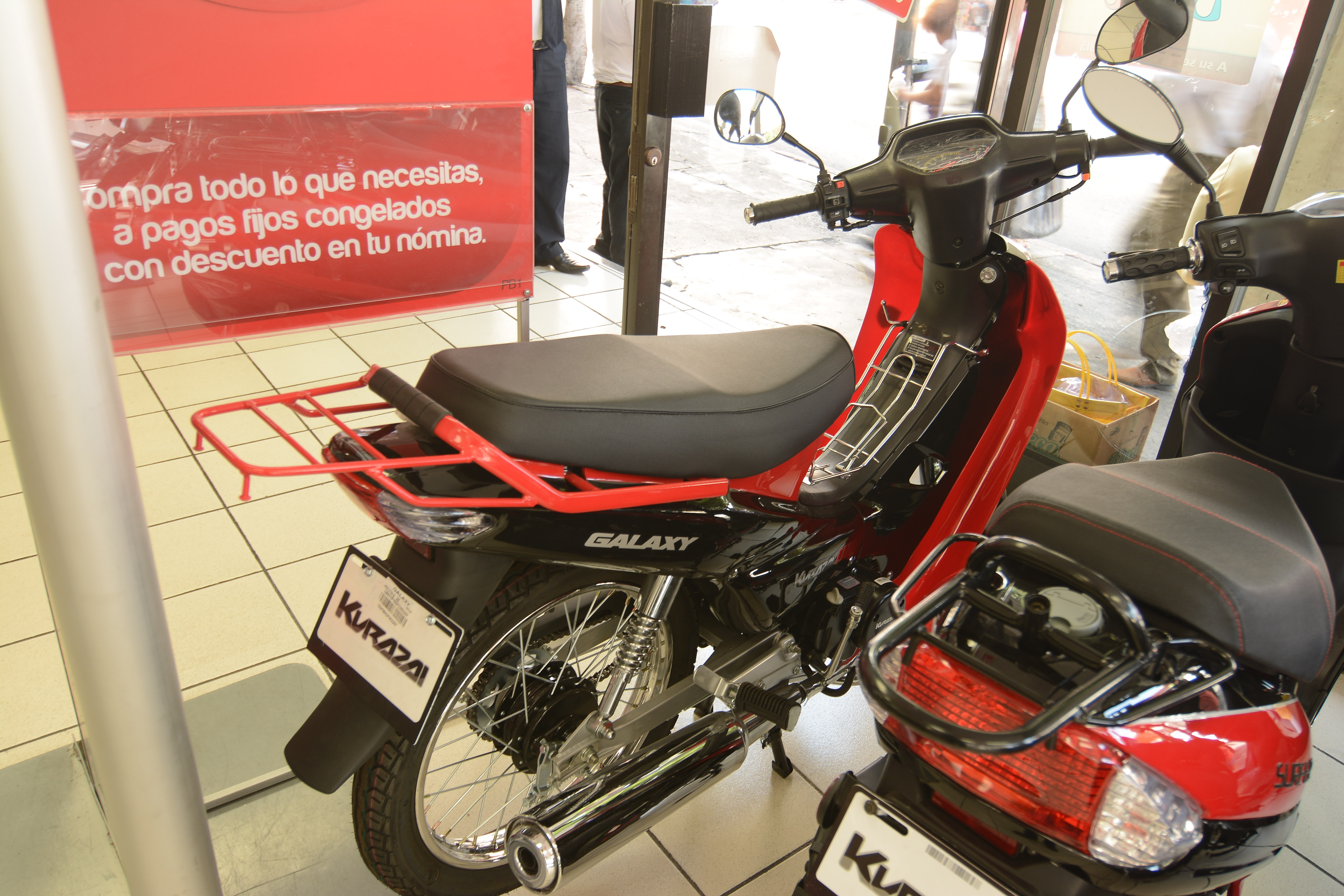 Motoneta Kurazai Galaxy 2015